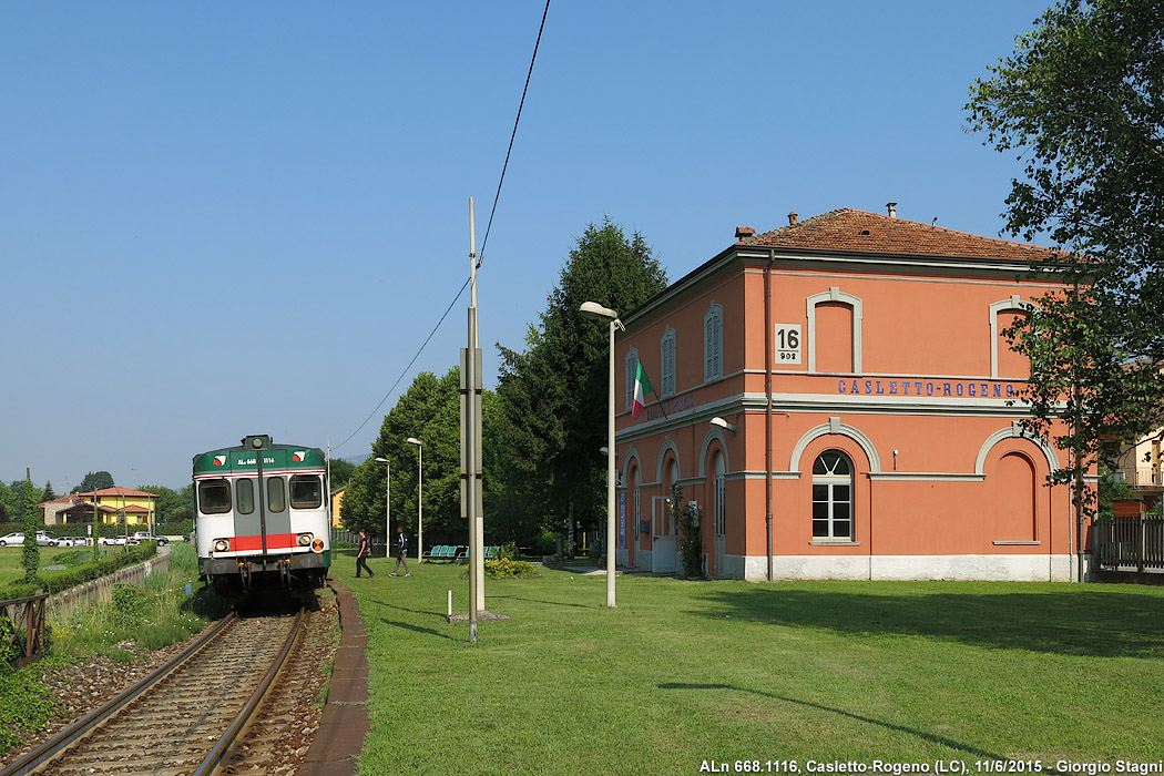 Stazione ferroviaria di Casletto-Rogeno. È in sosta l’automotrice ALn 668.1116.